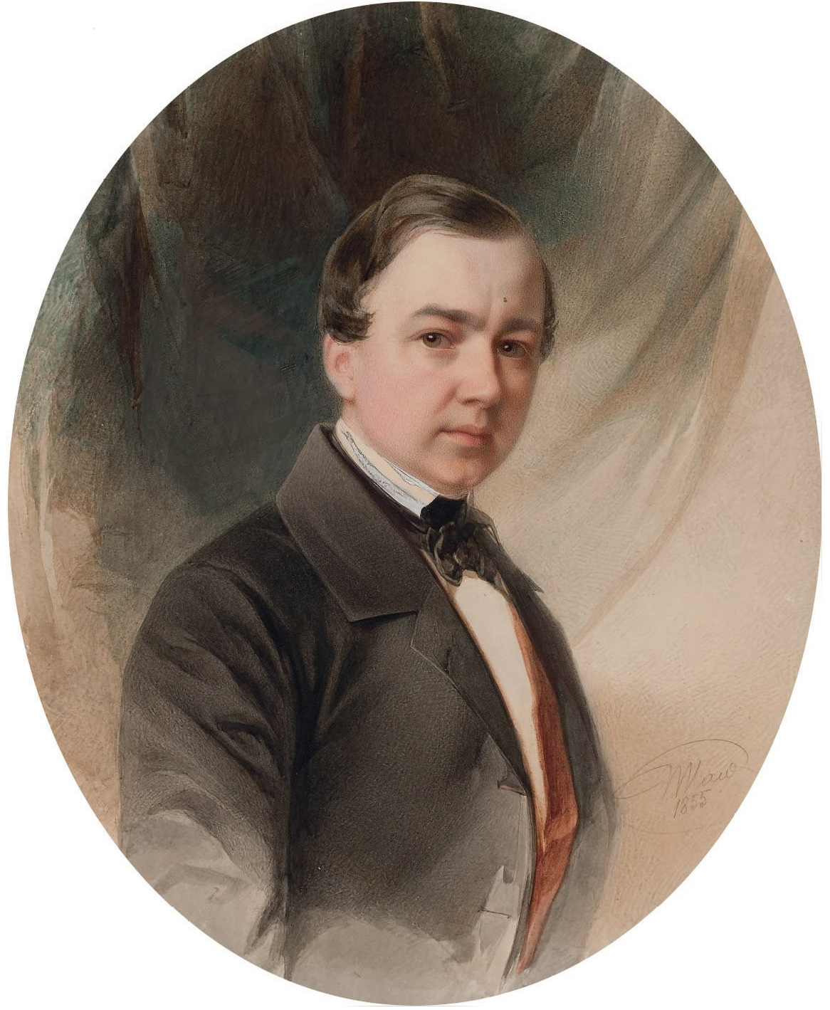 Гау Владимир Иванович